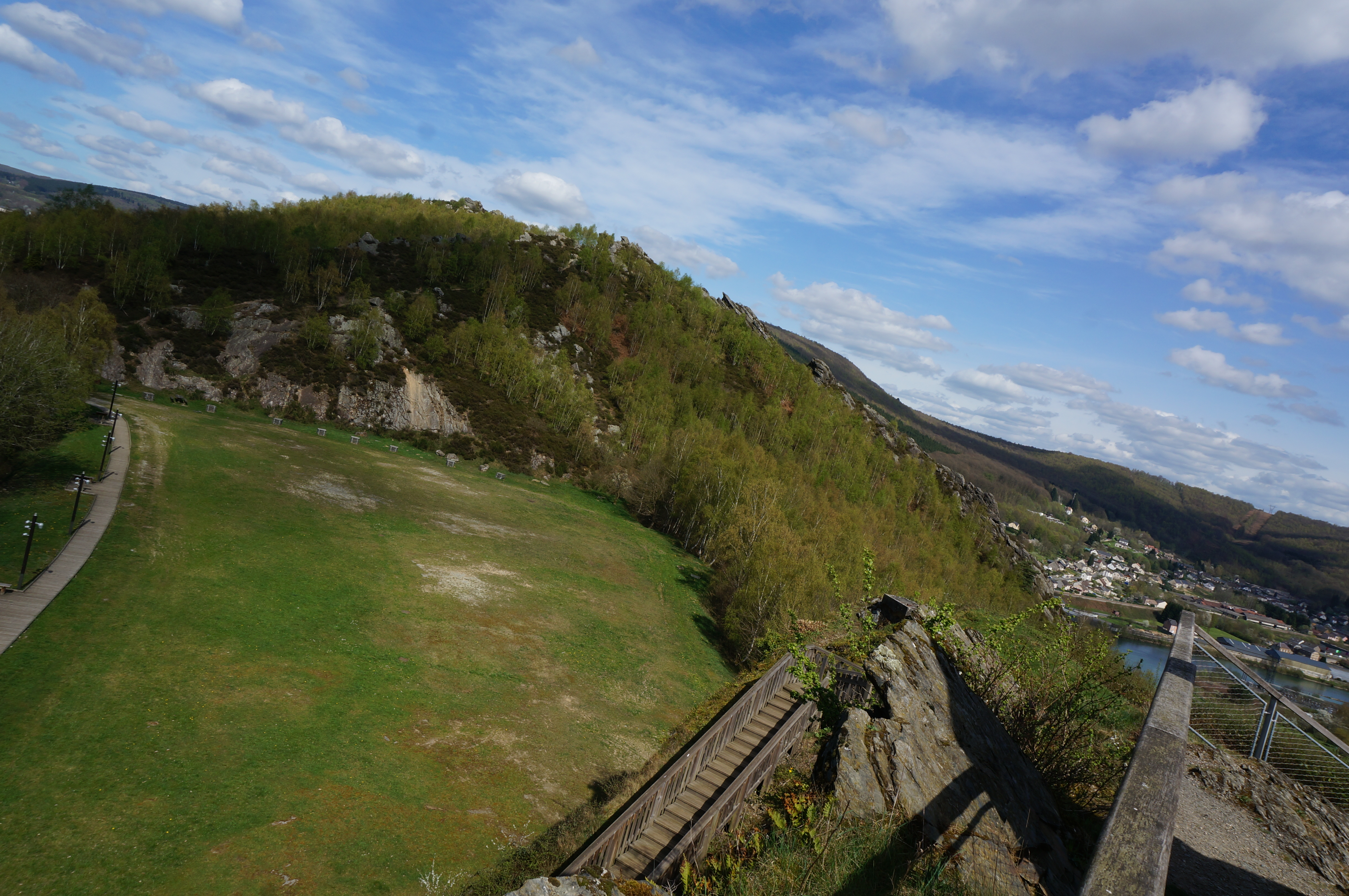 Vue sur l'espace qu'occupait le château.